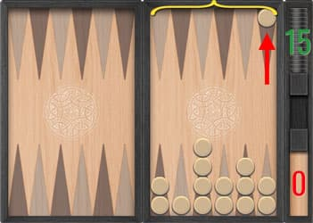 Кокс – бывает по договоренности